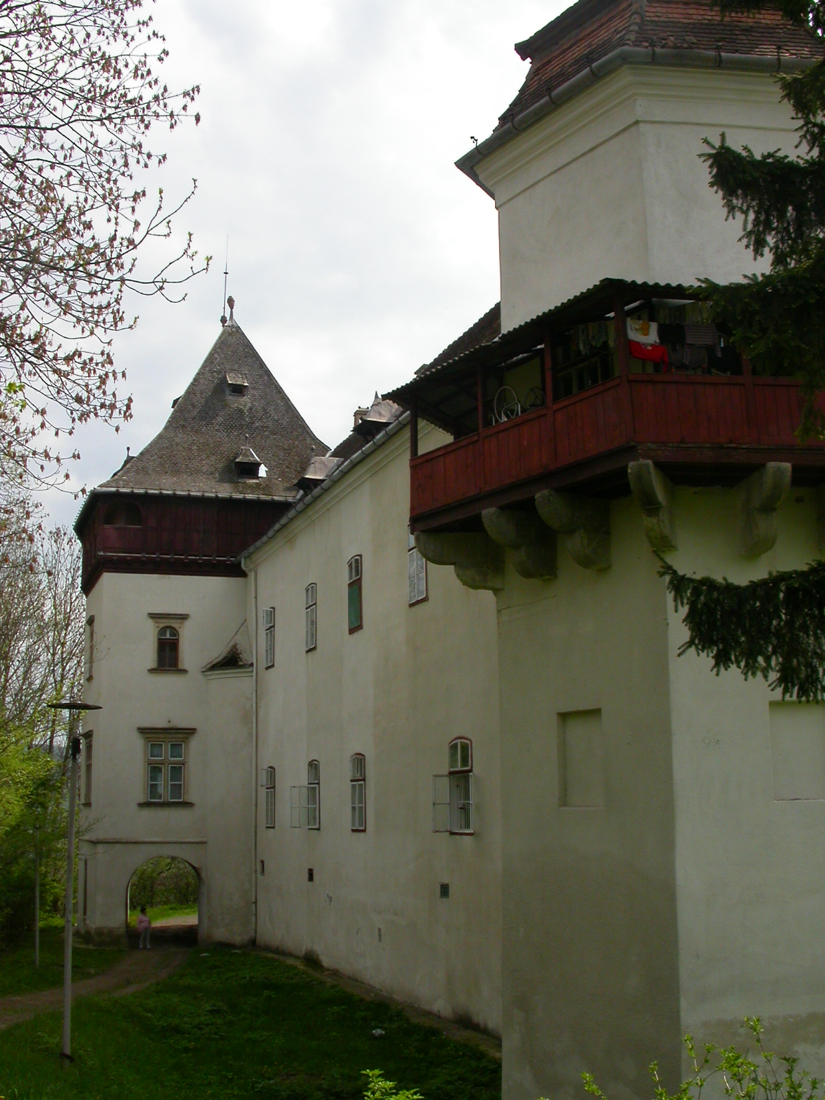 Ansamblul castelului Kendy-Kemeny, sec. XVI, sec. XIX